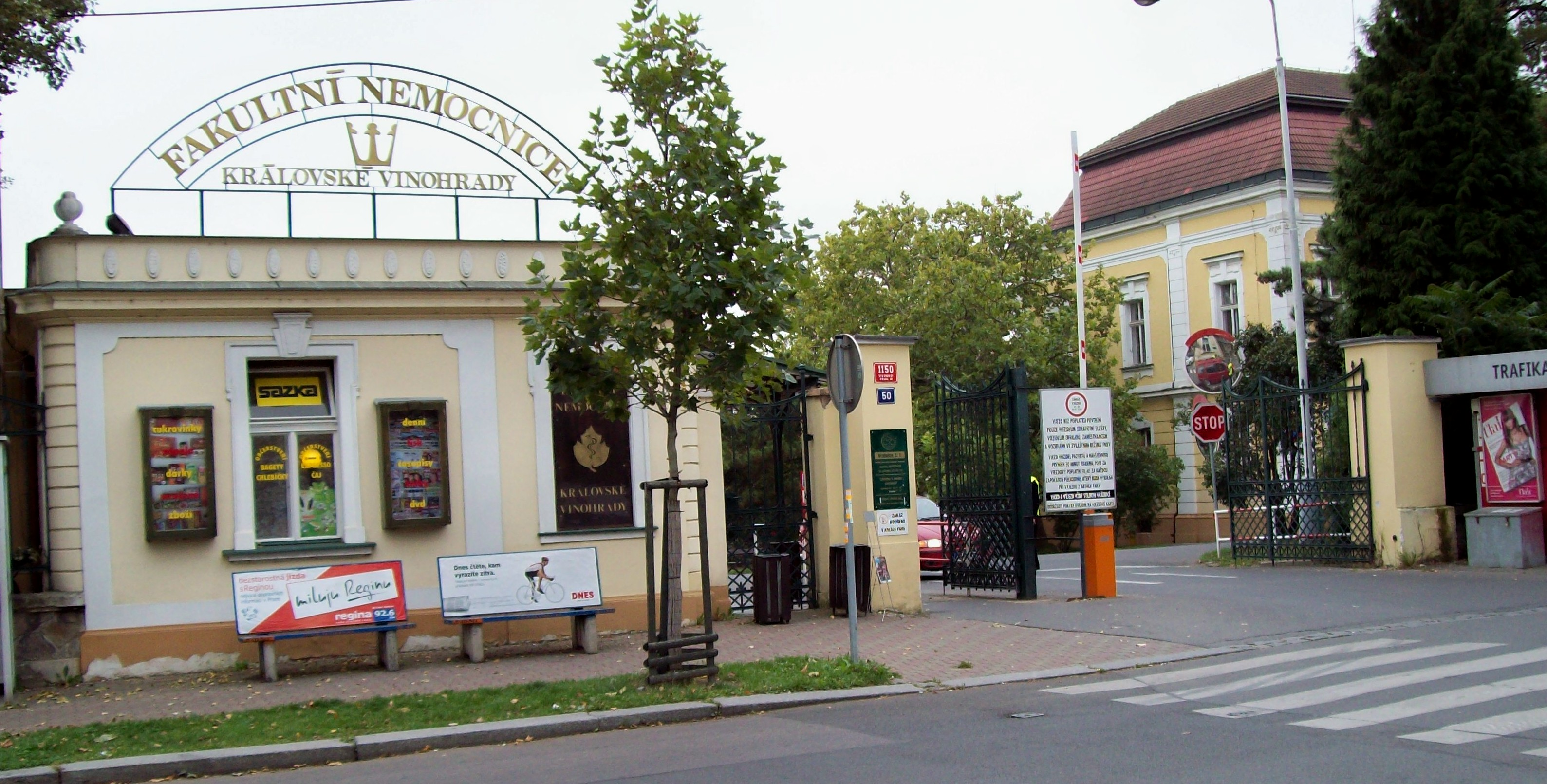 Hlavní vjezd a vchod do Fakultní nemocnice Královské Vinohrady ze Šrobárovy ulice, ul. Šrobárova 50, Praha 10.